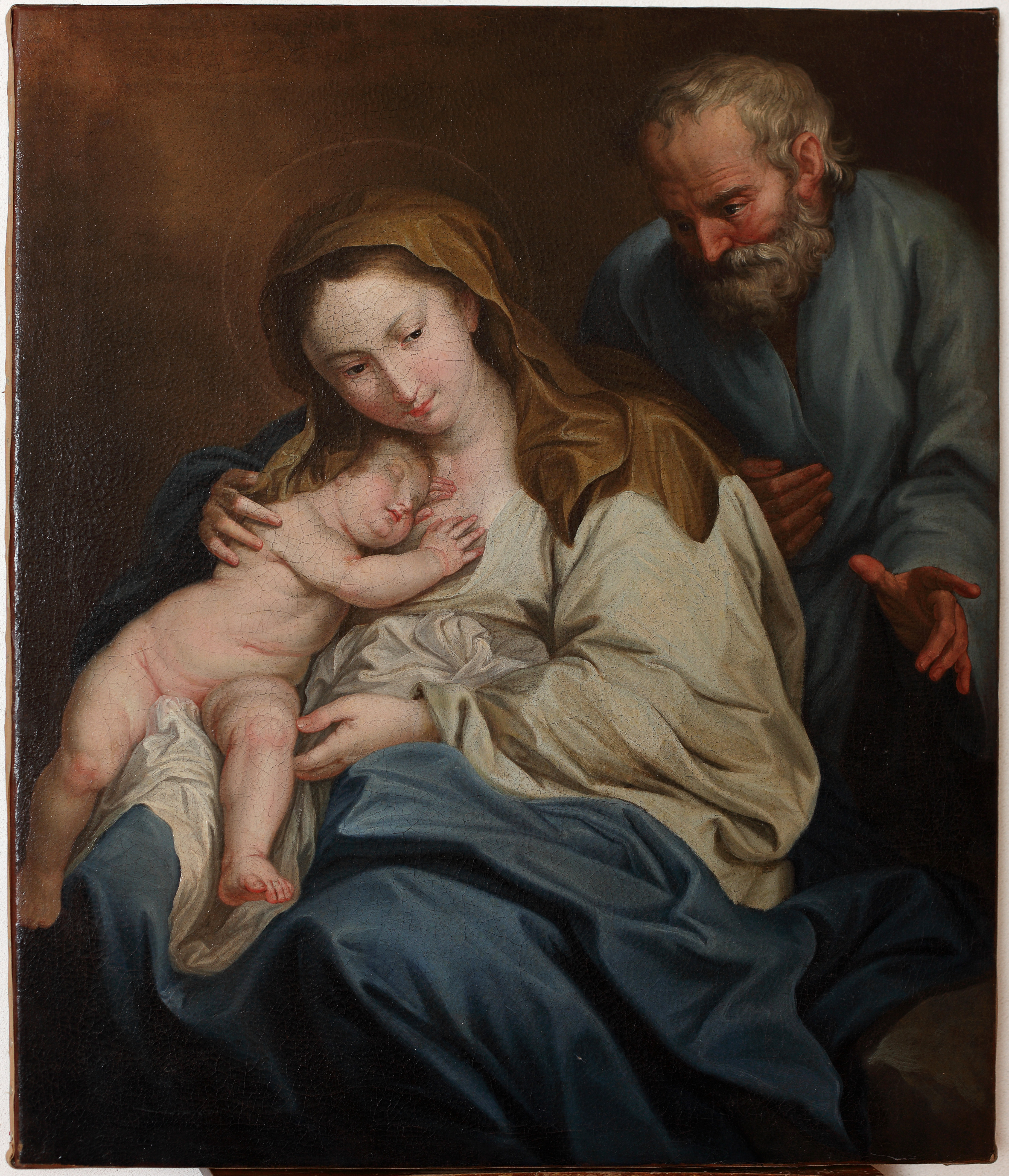 Tela della Sacra Famiglia di Giuseppe Renda (Alcamo 1772-1805)